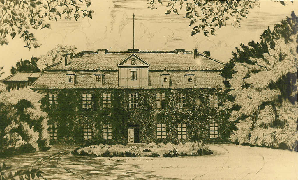 Gutshaus Falkenberg 1939, nach 1945 abgerissen. Das Gut Falkenberg selbst ist ein land- und forstwirtschaftlicher Betrieb in Falkenberg bei Fürstenwalde/Spree in der Gemeinde Madlitz-Wilmersdorf in Brandenburg. Derzeitiger Besitzer und Bewirtschafter ist Dipl. ing. agr. Albrecht v. Alvensleben (*1968). Das Gut Falkenberg wurde 1894 von Joachim v. Alvensleben (1856-1932) erworben, 1945 dessen Sohn Udo v. Alvensleben (1895-1970) durch die Bodenreform enteignet und seit 1991 von dessen Sohn Prof. Dr. Reimar v. Alvensleben und Enkel Albrecht v. Alvensleben teilweise zurück erworben bzw. gepachtet und als Familienbetrieb wieder eingerichtet. Gegenwärtig umfasst der Betrieb zusammen etwa 750 ha Landwirtschaft und 800 ha Wald, die von der Familie und einer Lohnarbeitskraft bewirtschaftet werden.